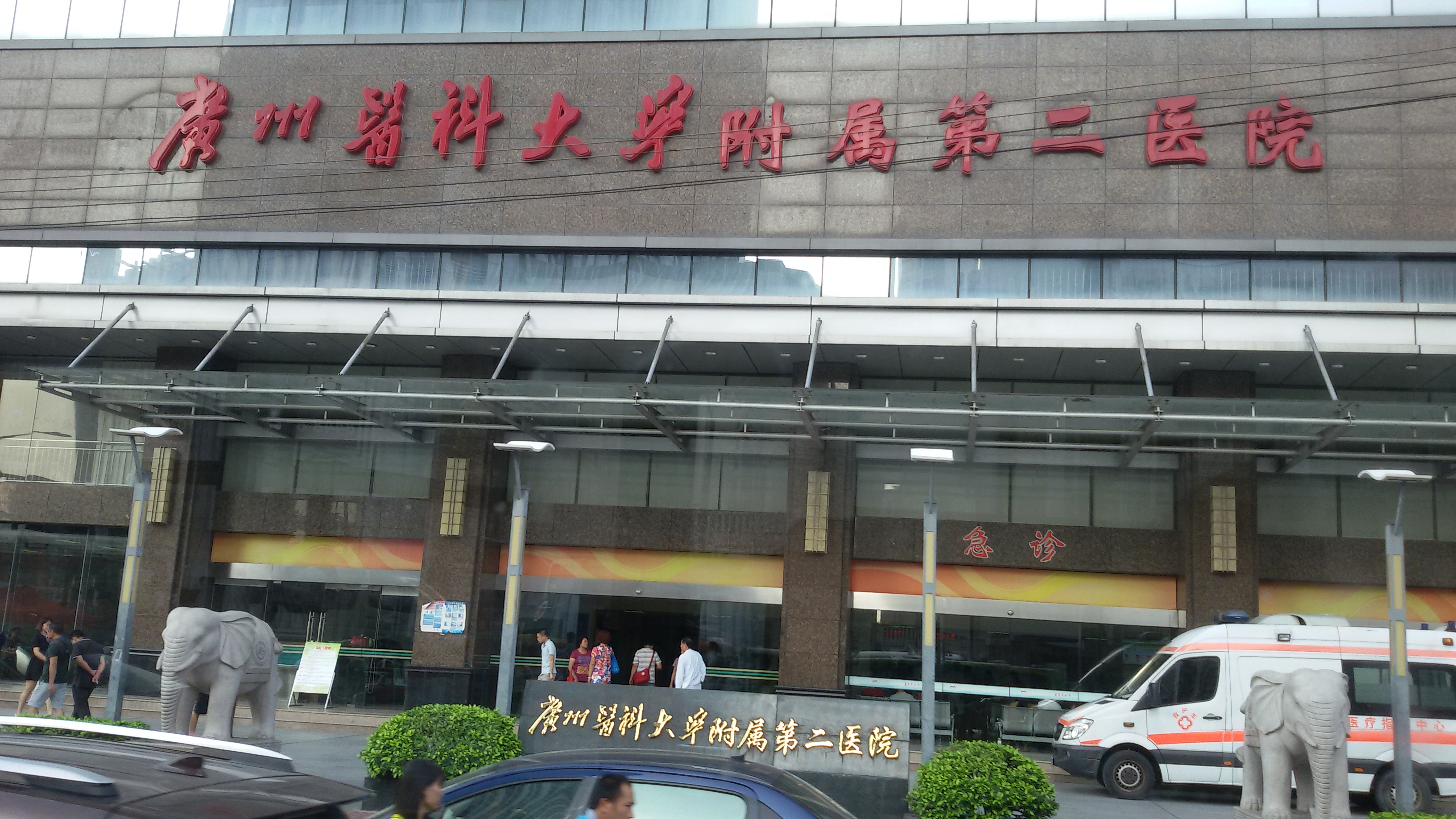 粵語: 廣州醫科大學附屬第二醫院（江南大道南門口）